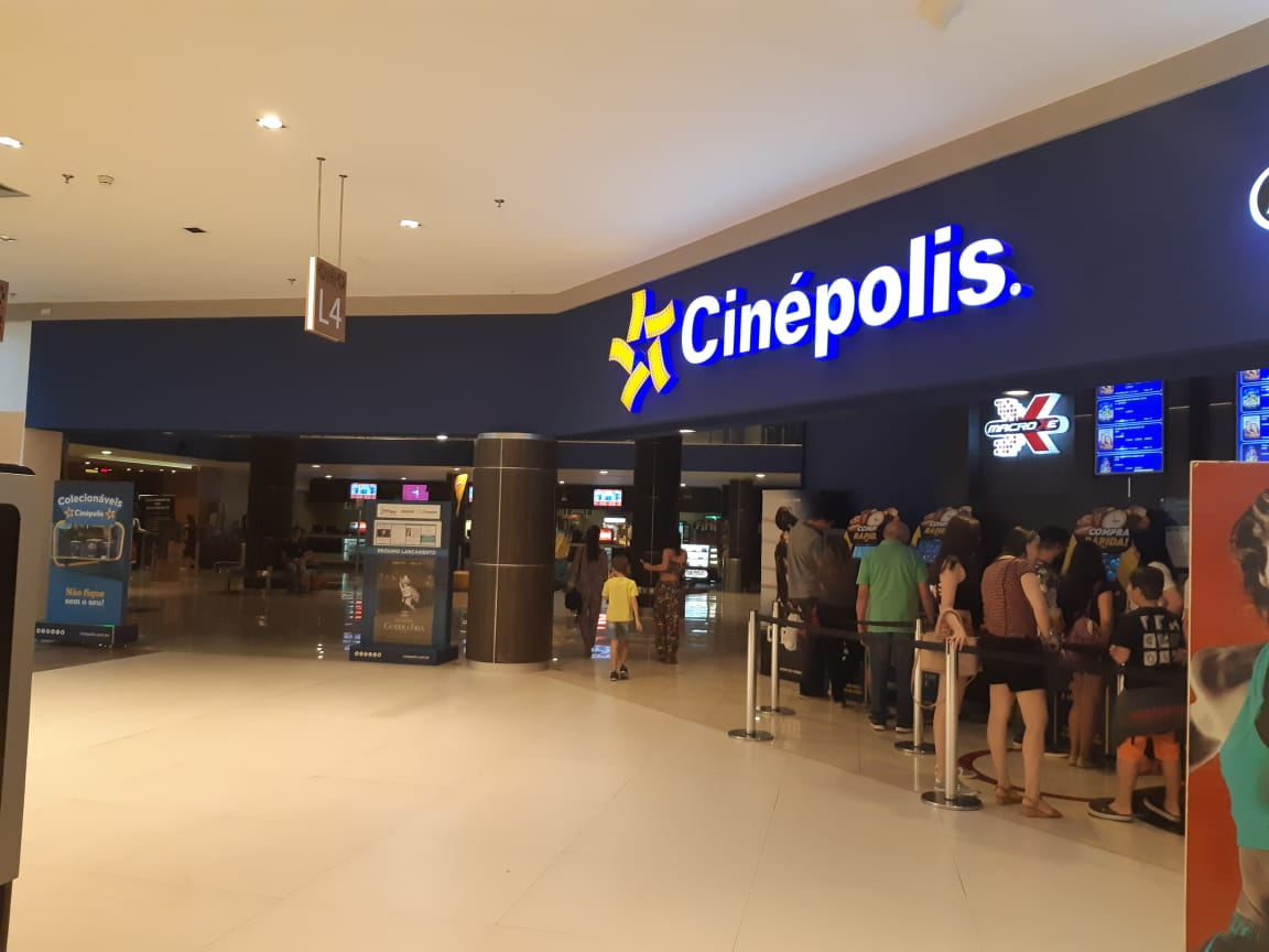 Fachada do complexo de cinemas Cinépolis Rio Poty, instalado no shopping do mesmo nome em Teresina, PI